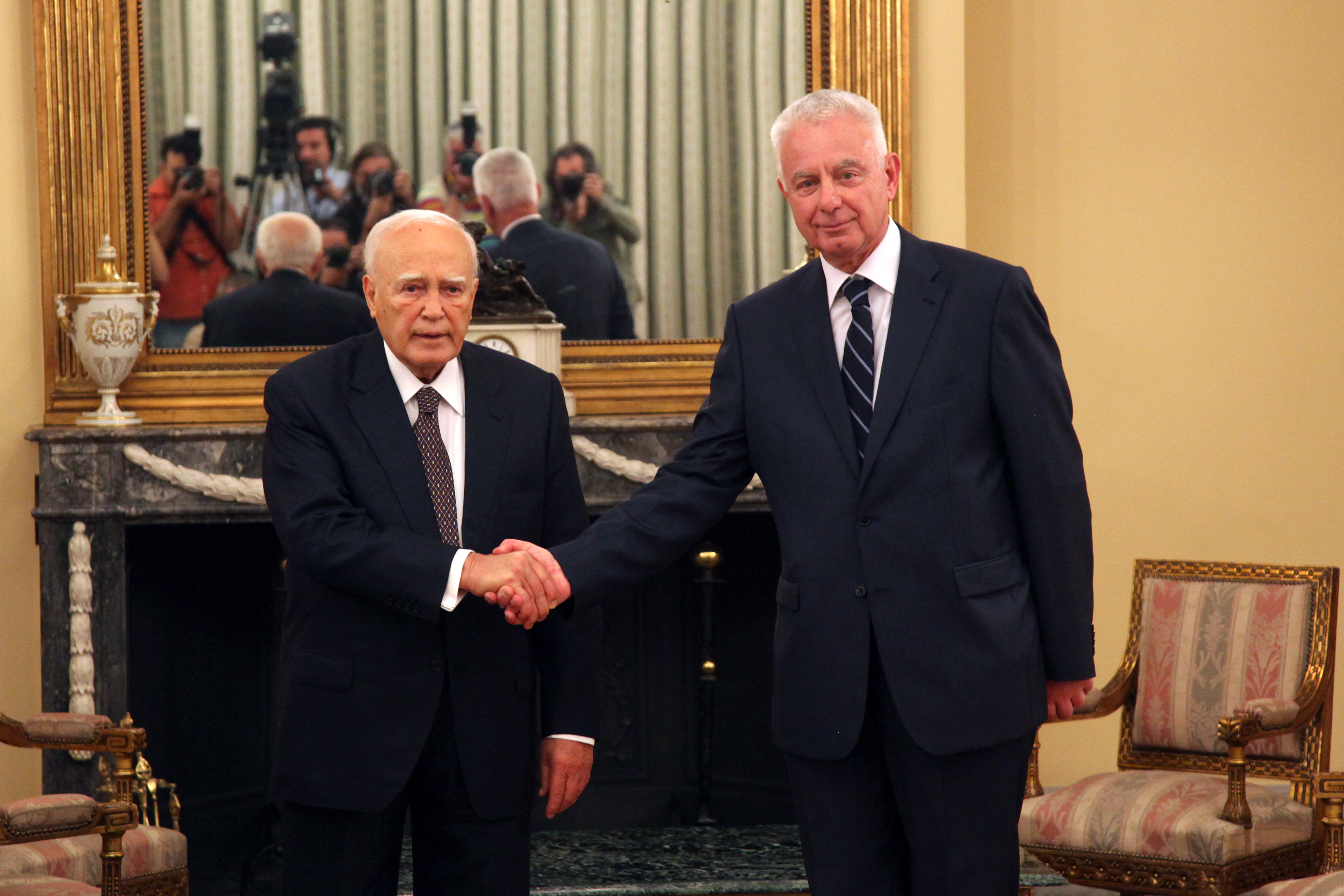 Ορκωμοσία Πρωθυπουργού Παναγιώτη Πικραμμένου